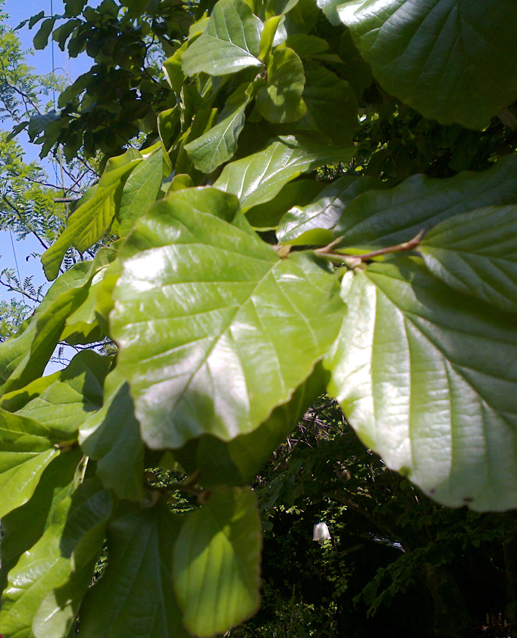 برگ درخت انجیلی در اردیبهشت ماه